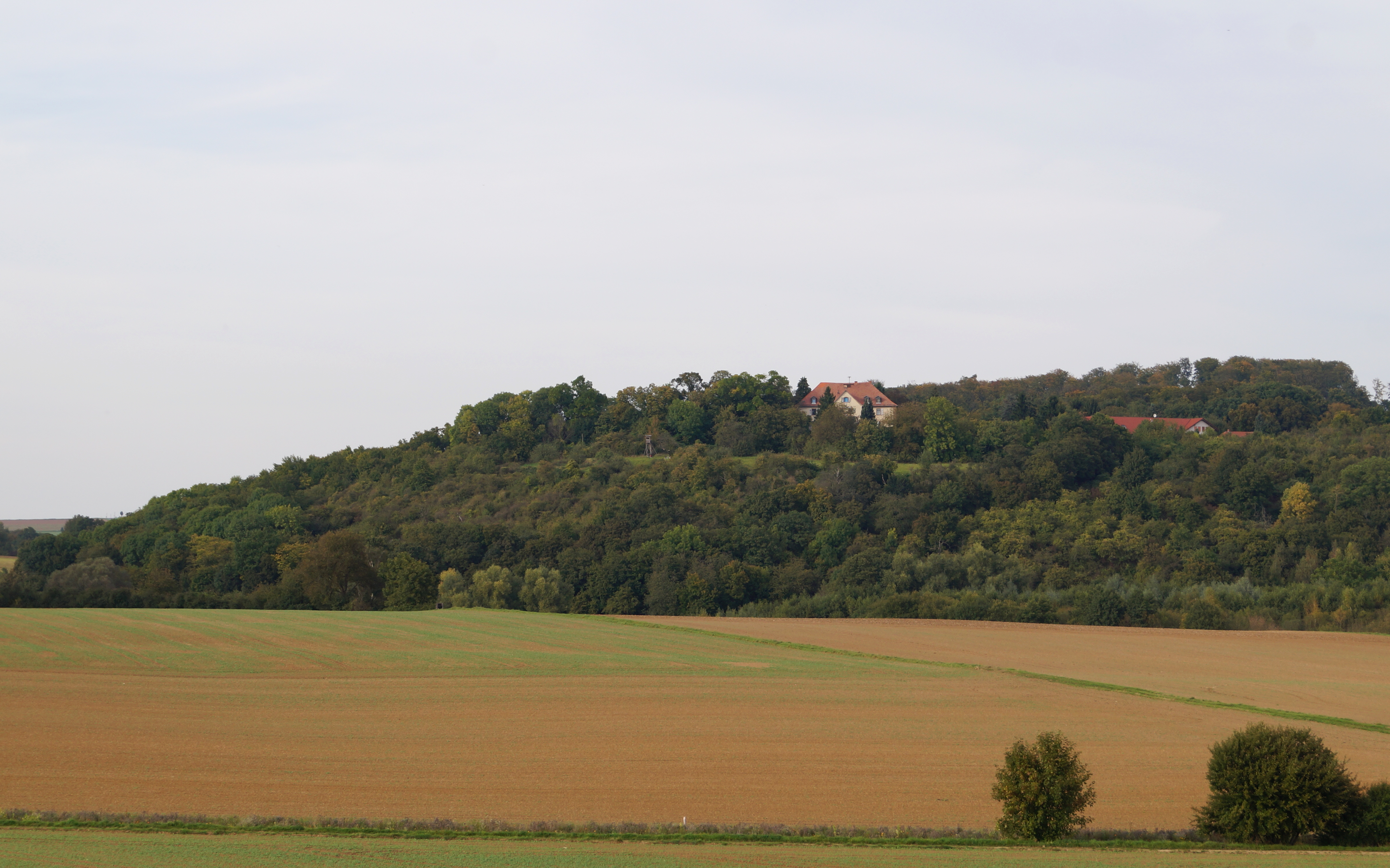 Schloss Naumburg bei Nidderau-Erbstadt, Hessen. Ansicht von Süden 2014, Standort: Brücke der neu fertiggestellten Umgehungsstraße.